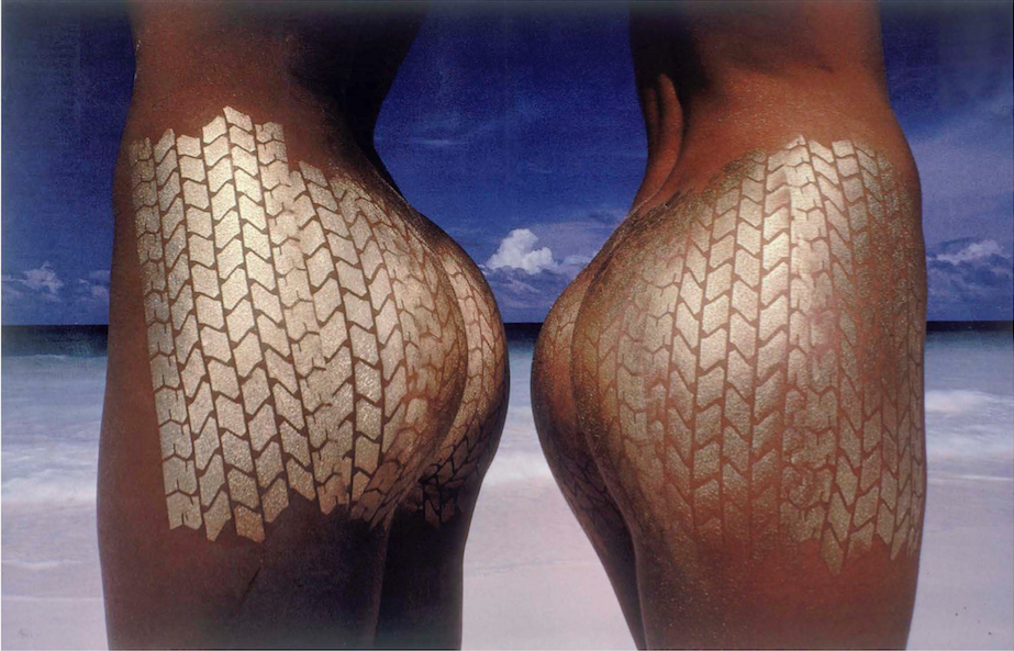 Photo prise aux Bahamas pour le catalogue Pirelli 1984